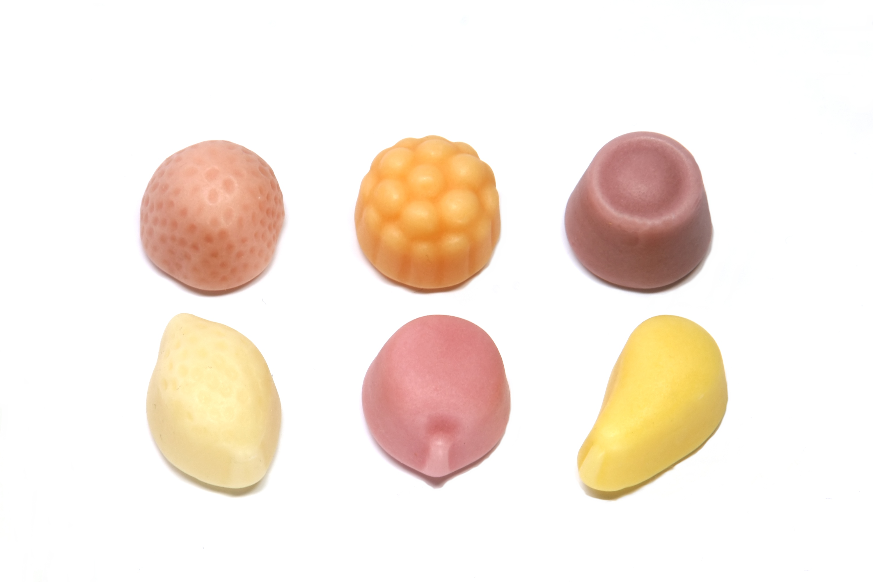 Joghurt-Gums des Herstellers Katjes Fassin GmbH + Co. KG, Emmerich am Rhein